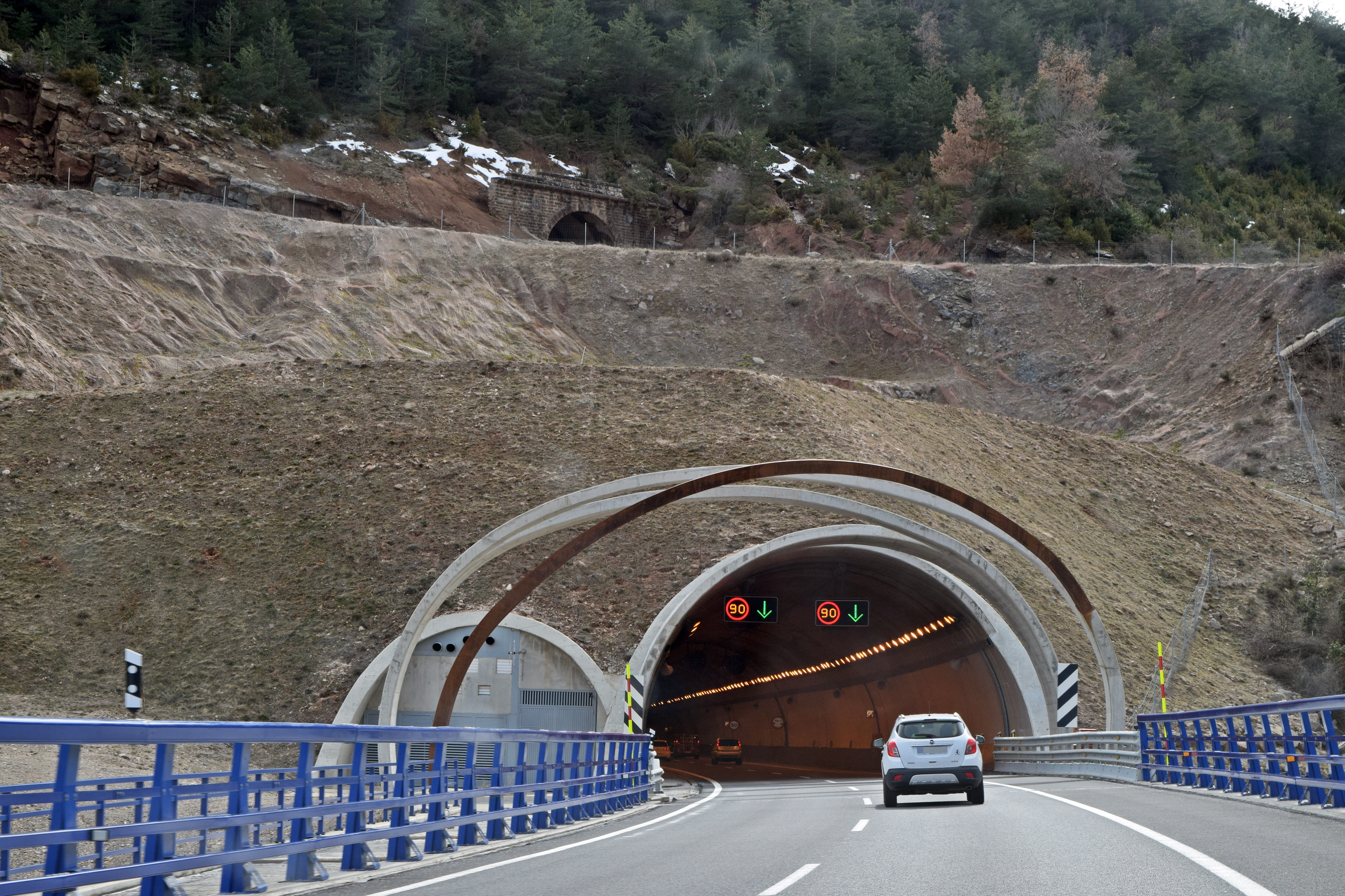 Túnel de Monrepós 1, en Arguís (Huesca). Nacional N-330.